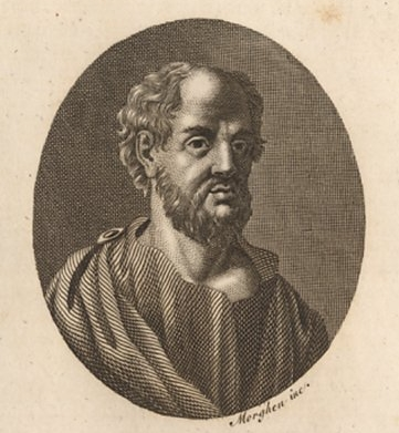 Zeusi, pittore nato a Eraclea (l'attuale Policoro) nel 397 a.C.